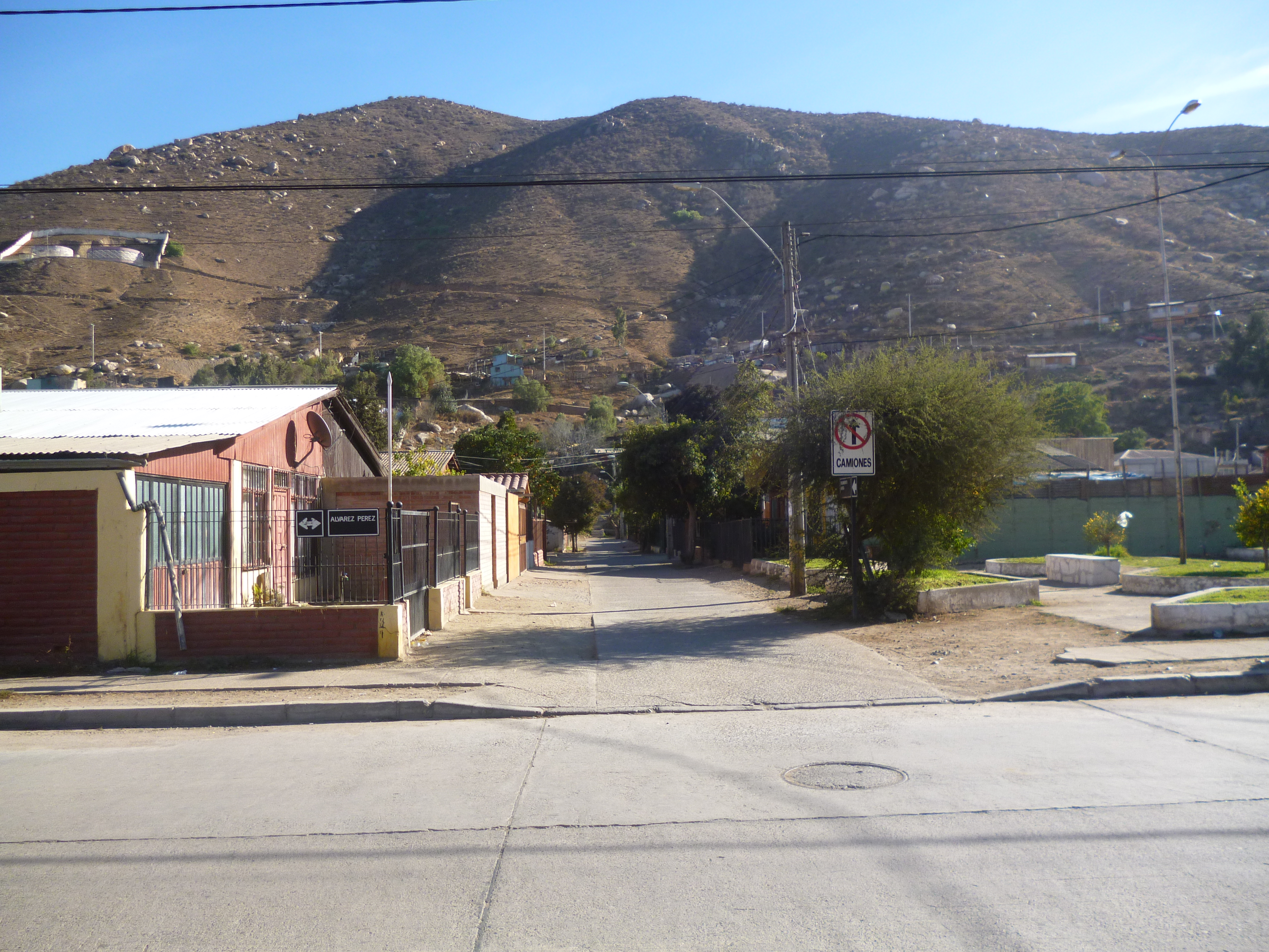 Poblacion Fray Madariaga